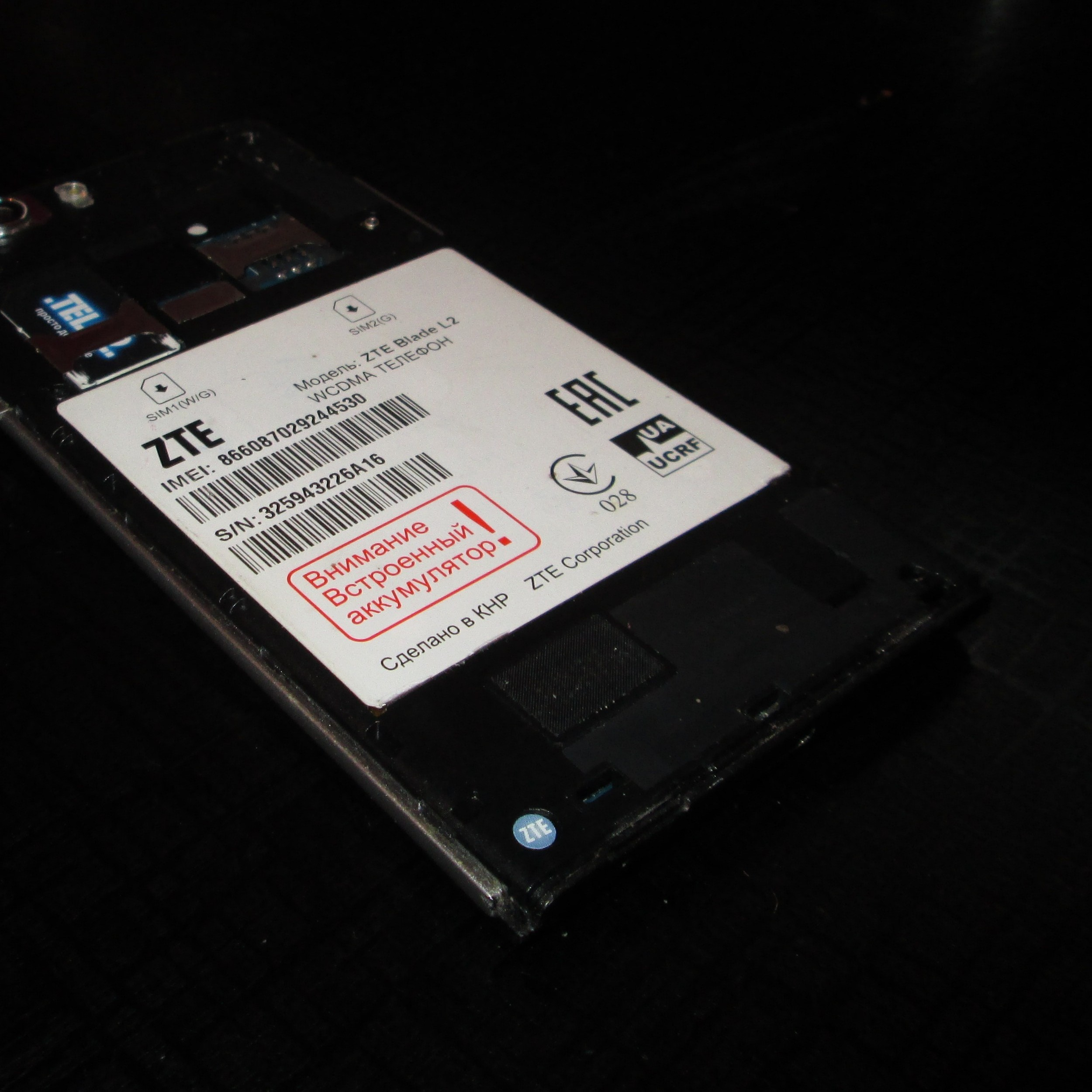 Знак EAC на сотовом телефоне